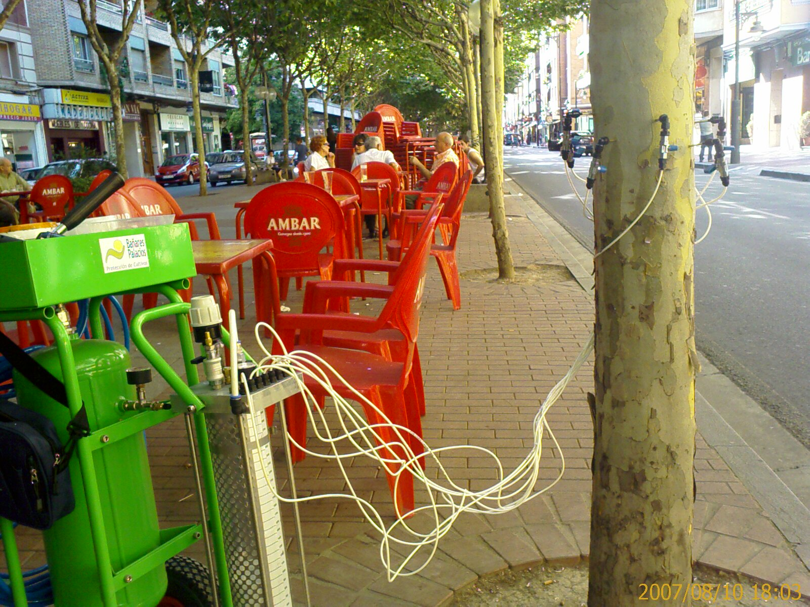 Endoterapia